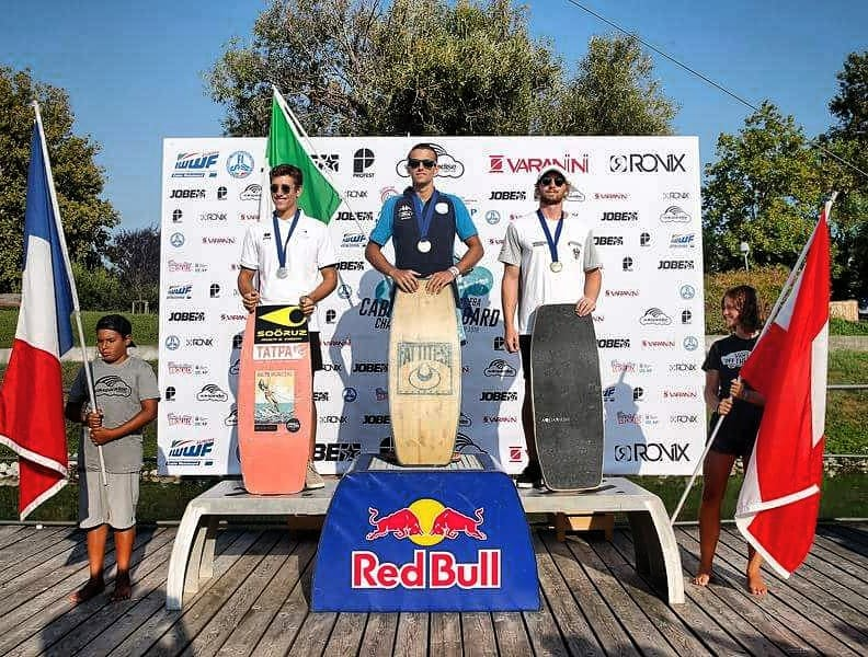 Maurizio Marassi primo sul podio dei Campionati Europei di cablewakeboard 2018 per la categoria Wakeskate Open Men. È il primo italiano nella storia a vincere un oro nella categoria Open Wakeskate a d un campionato europeo.